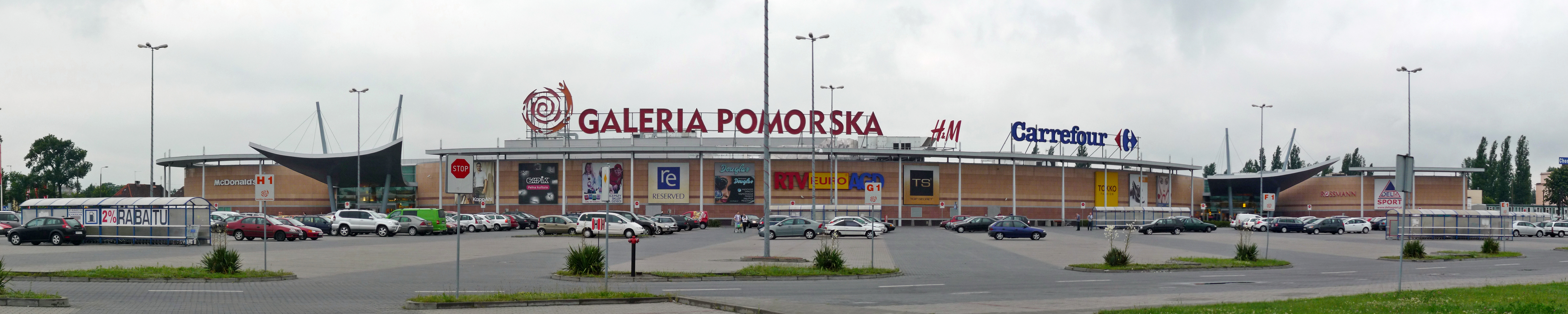 Galeria Pomorska w Bydgoszczy.